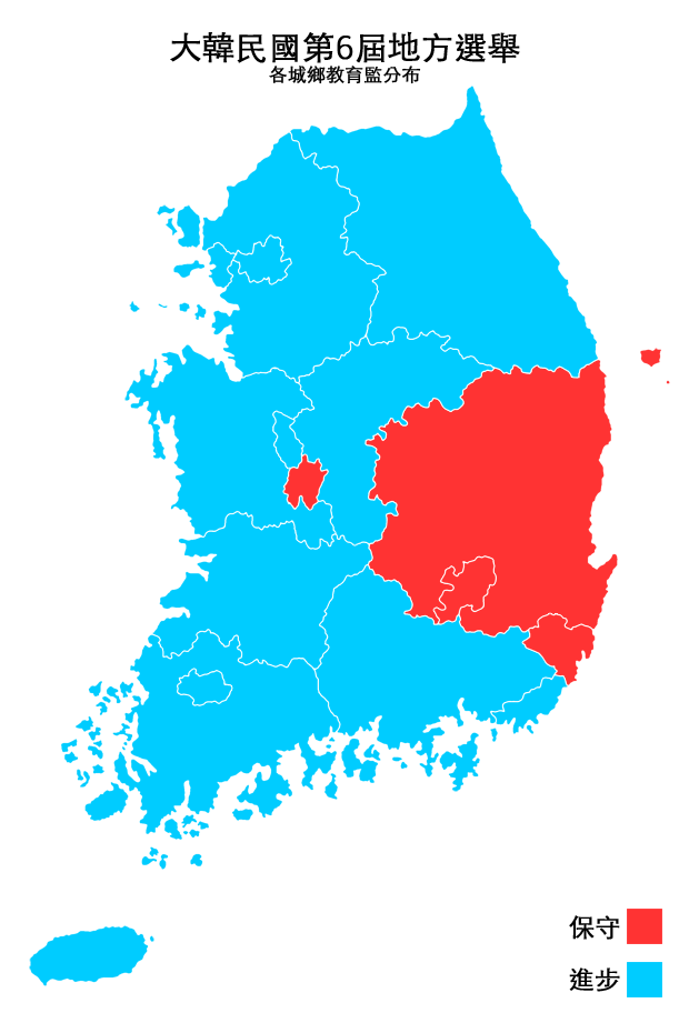 大韓民國第6届地方選舉，各城鄉教育監分布（繁體中文版）